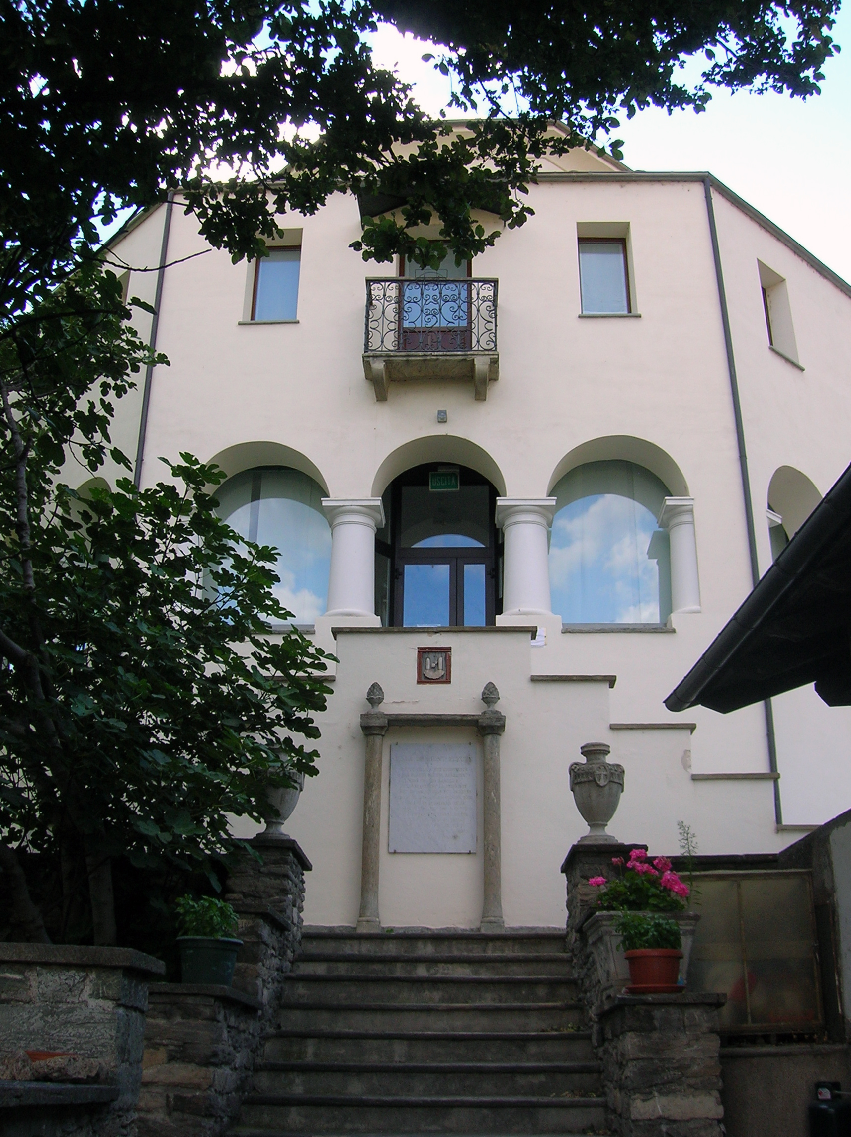 Castello di Montfleury, Aosta, Valle d'Aosta, Italia.